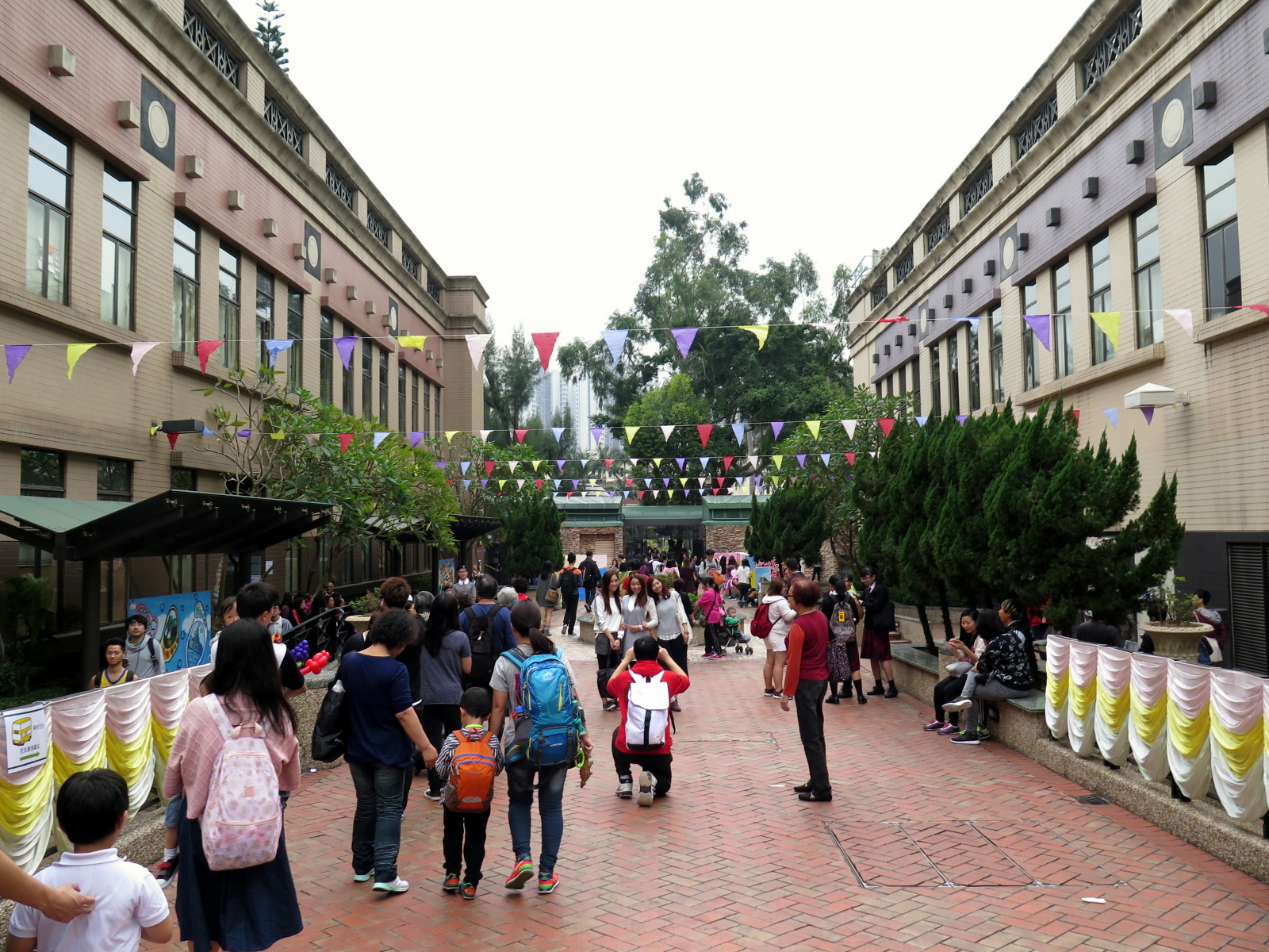 Castle Peak Hospital